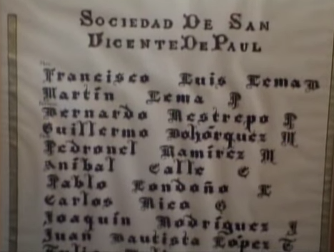 Listado de fundadores sociedad San Vicente de Paúl de Ciudad Bolívar Antioquia